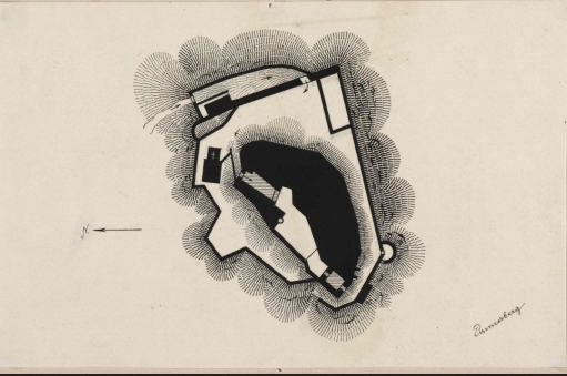 Grundriss der Burgruine Emmerberg in Niederösterreich, Federzeichnung in Schwarz.